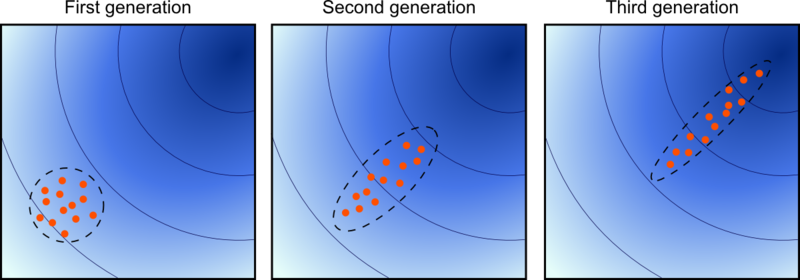 800px-Concept of directional optimization in CMA-ES